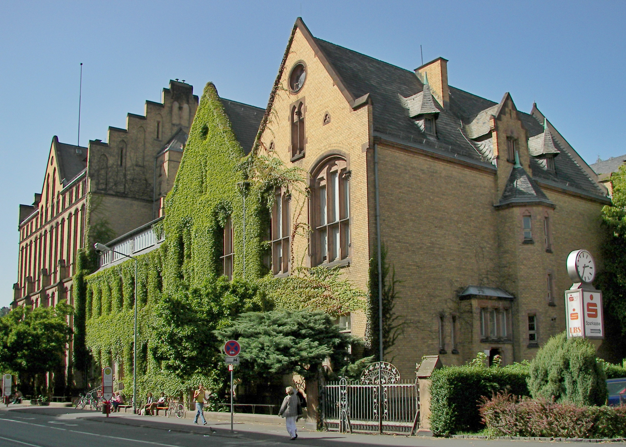 Uni Marburg, Fachbereich Wirtschaftswissenschaften, ehemalige Universitätsbibliothek. Erbaut 1897-1900 in Anlehnung an die Backsteingotik.